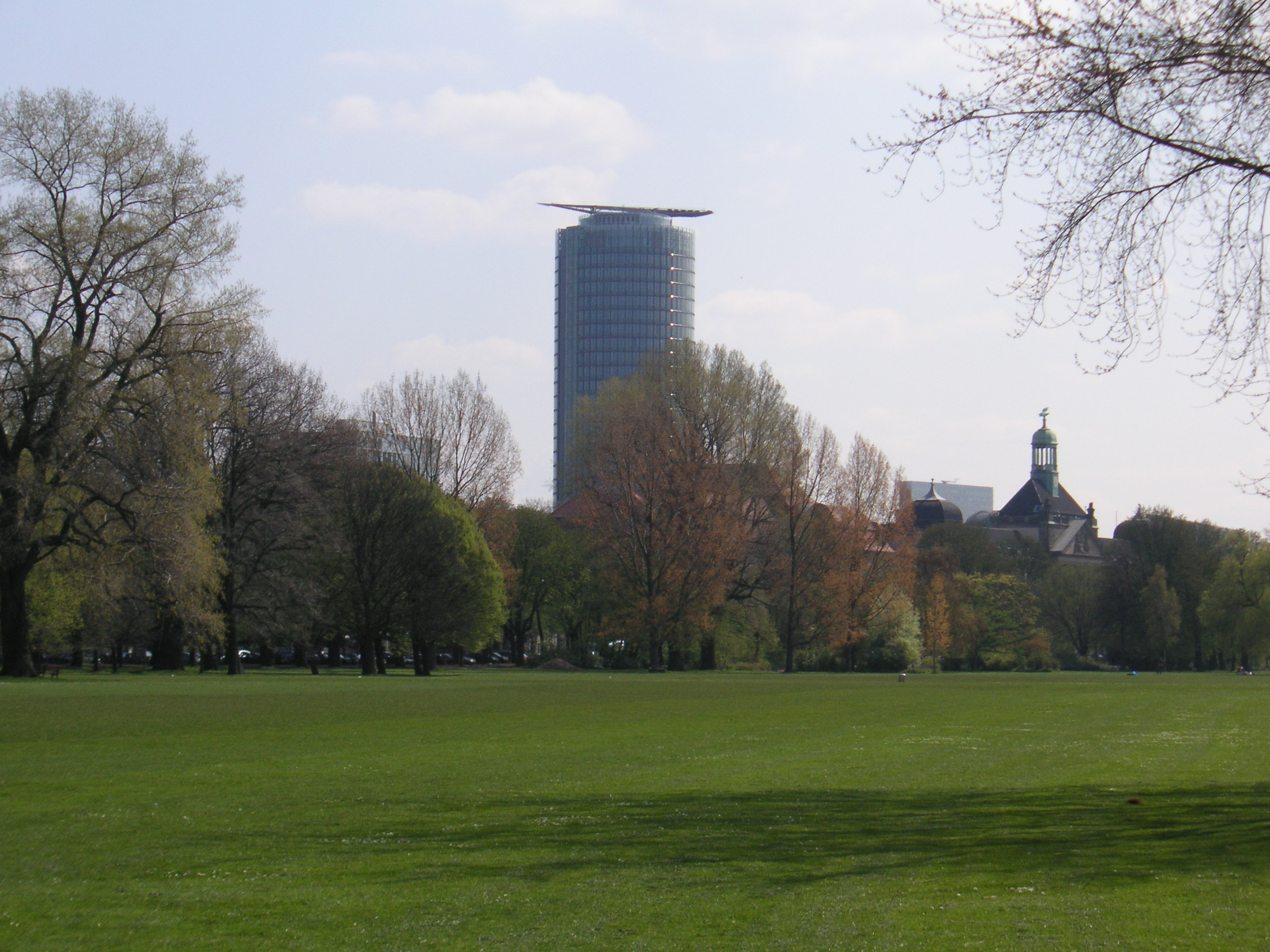 Rheinpark Düsseldorf-Golzheim, im Hintergrund Victoria-Turm und Regierungspräsidium